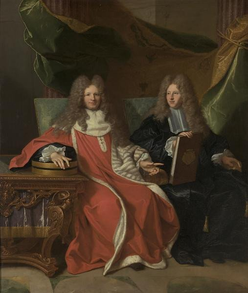 Portrait de Pierre-Cardin Lebret (1639-1710) and his son Cardin Le Bret (1675-1734), présidents à mortier at the parlement de Provence.